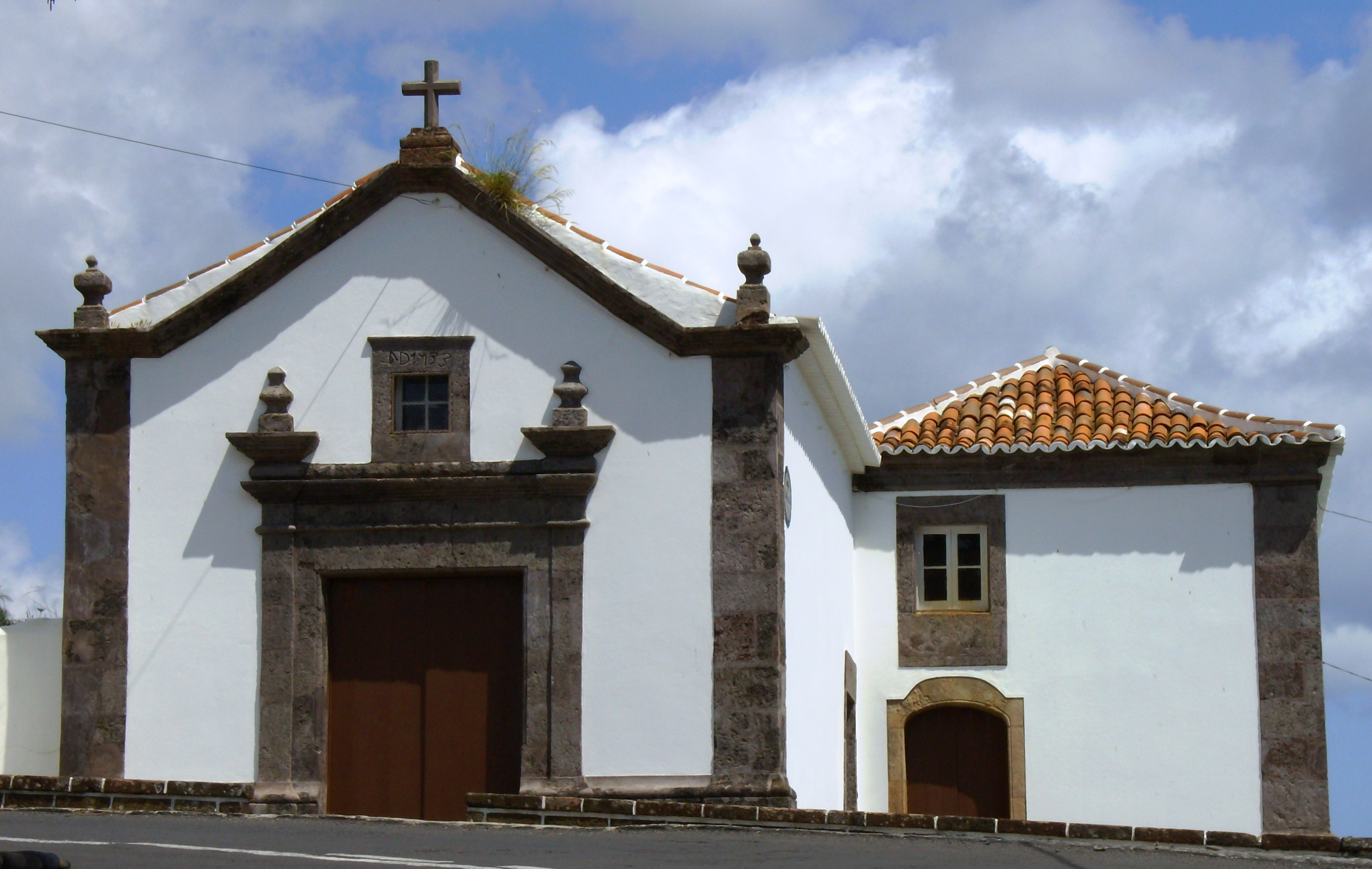 Ermida de São Pedro Gonçalves Telmo, Ilha de Santa Maria (Açores), Portugal.